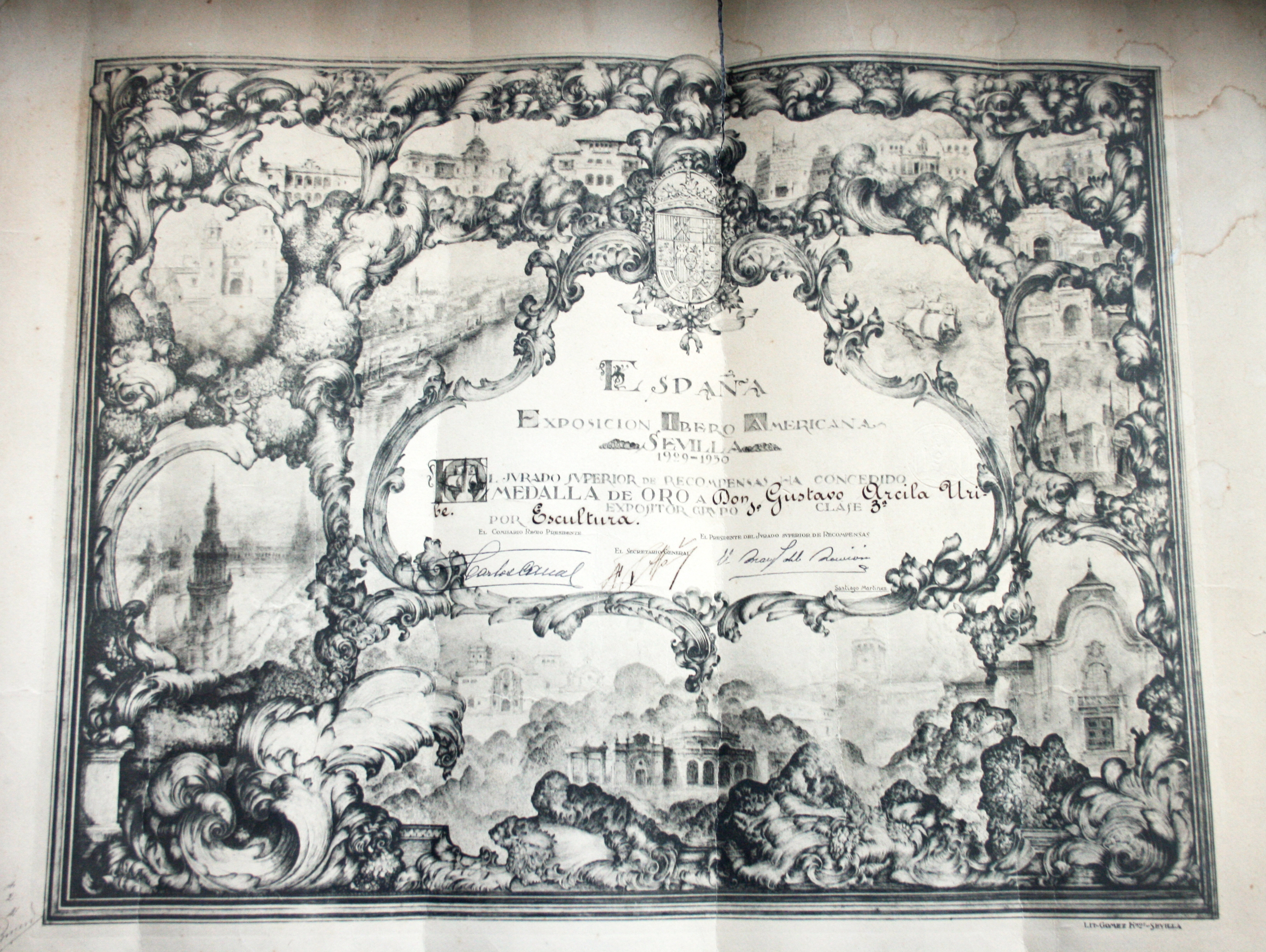 Sevilla Diploma del escultor Gustavo Arcila Uribe